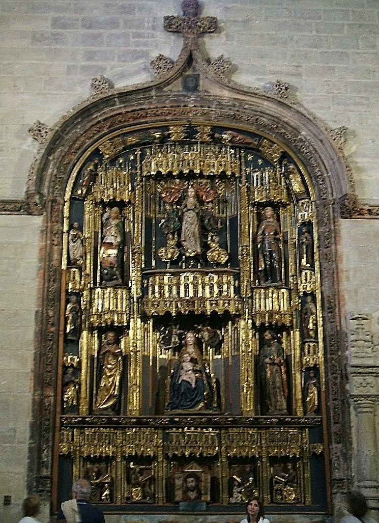 Retablo de la Capilla de Nuestra Señora de la Buena Mañana, Iglesia de San Gil Abad (Burgos)